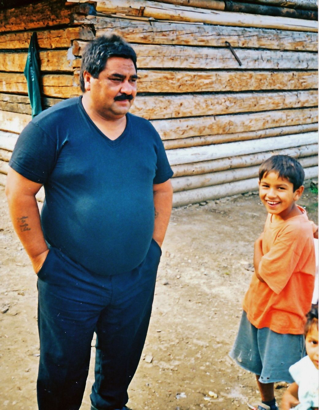 Rómovia z Letanovského mlyna, okres Sp. Nová Ves. Rok 2002